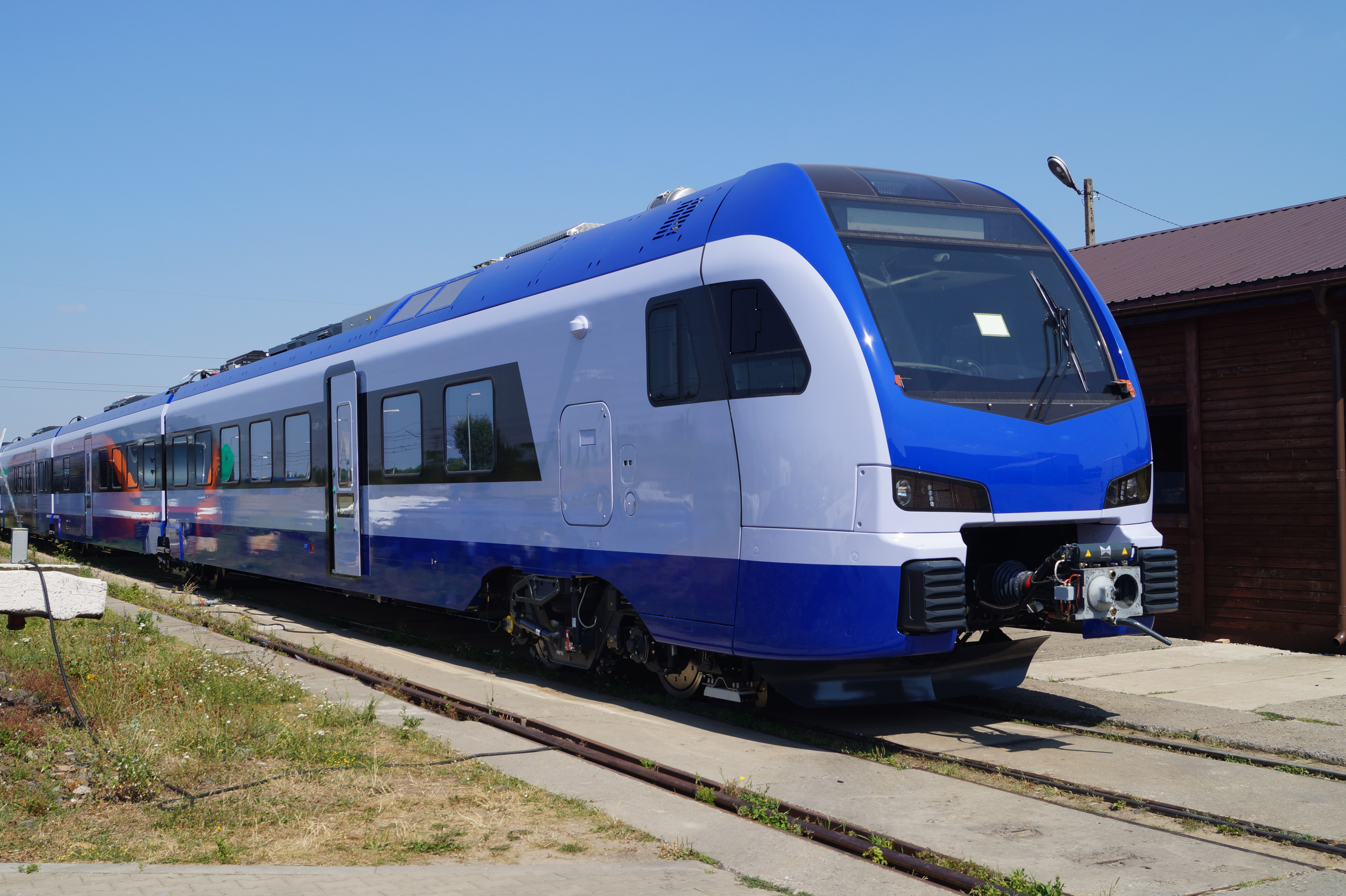 EZT Stadler FLIRT3 (ED160) dla PKP Intercity